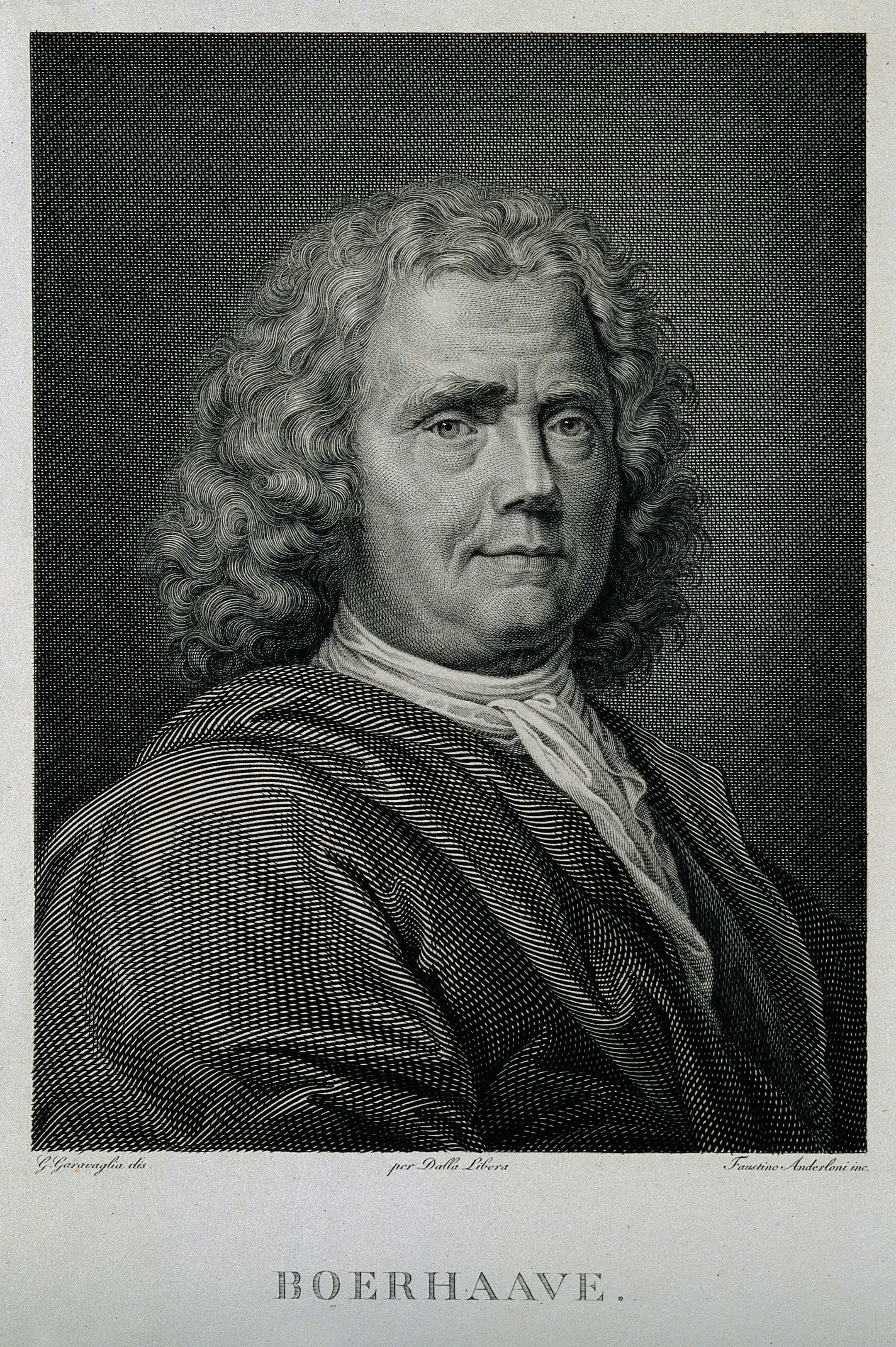 Hermann Boerhaave. Line engraving by F. Anderloni after G. Garavaglia. Iconographic Collections Keywords: engravings; portrait prints; boerhaave, hermann, 1668-1738; Faustino Anderloni; Giovita Garavaglia; Hermann Boerhaave